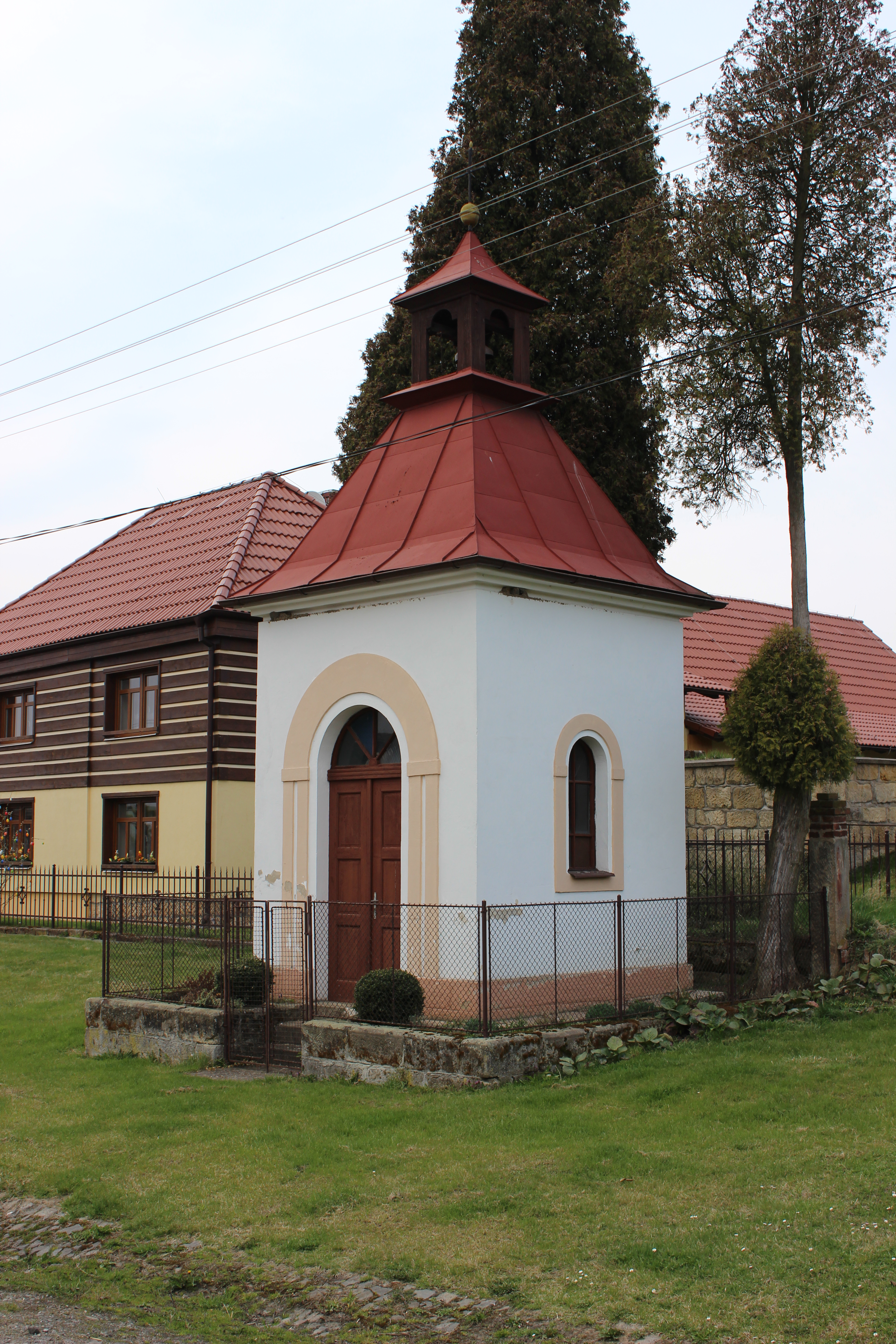 Kaplička ve Skramouši. This photograph was taken with a Canon EOS 600D.